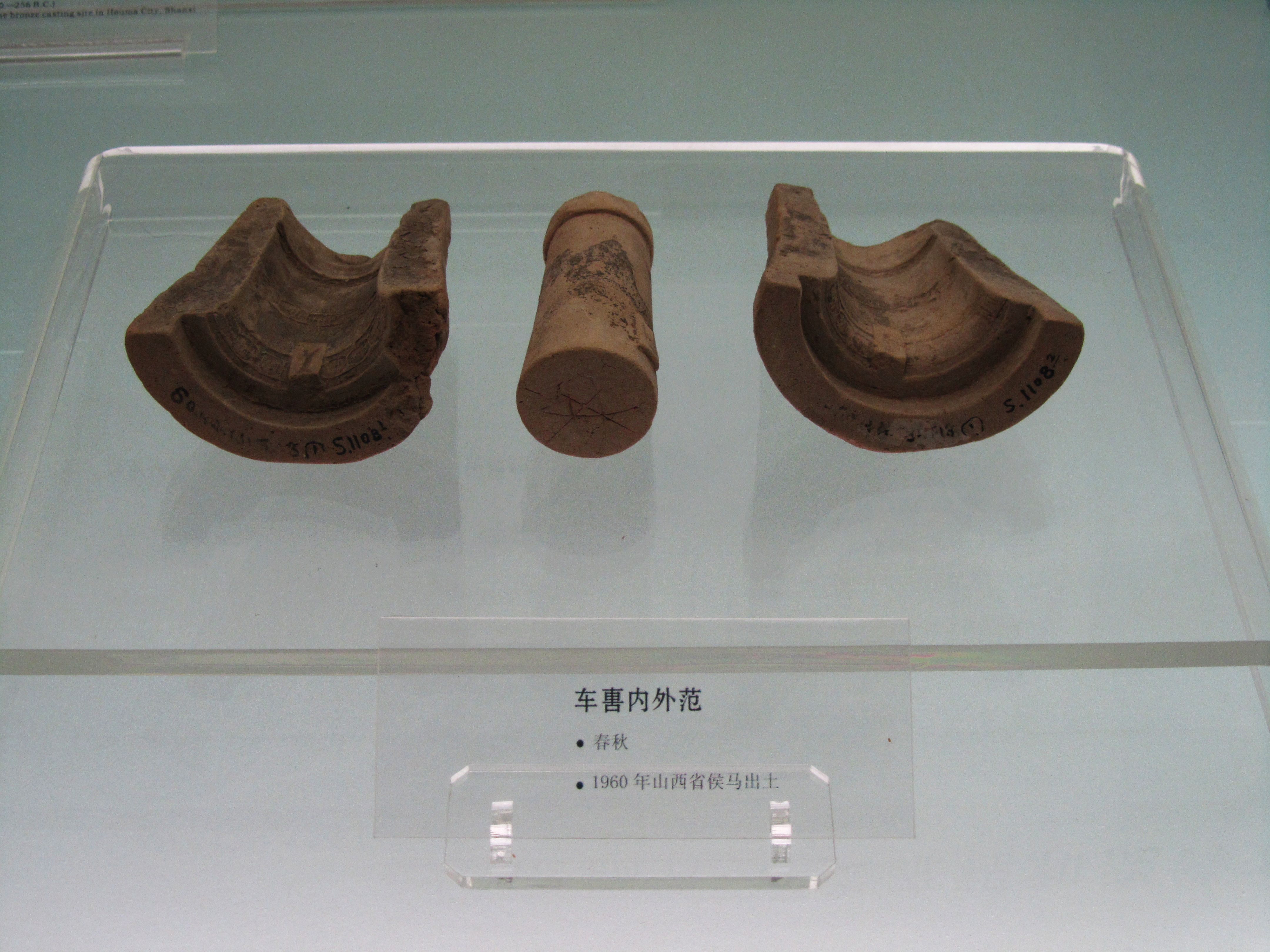 山西博物院馆藏陶范之车軎内外范，春秋，1960年山西省侯马出土。